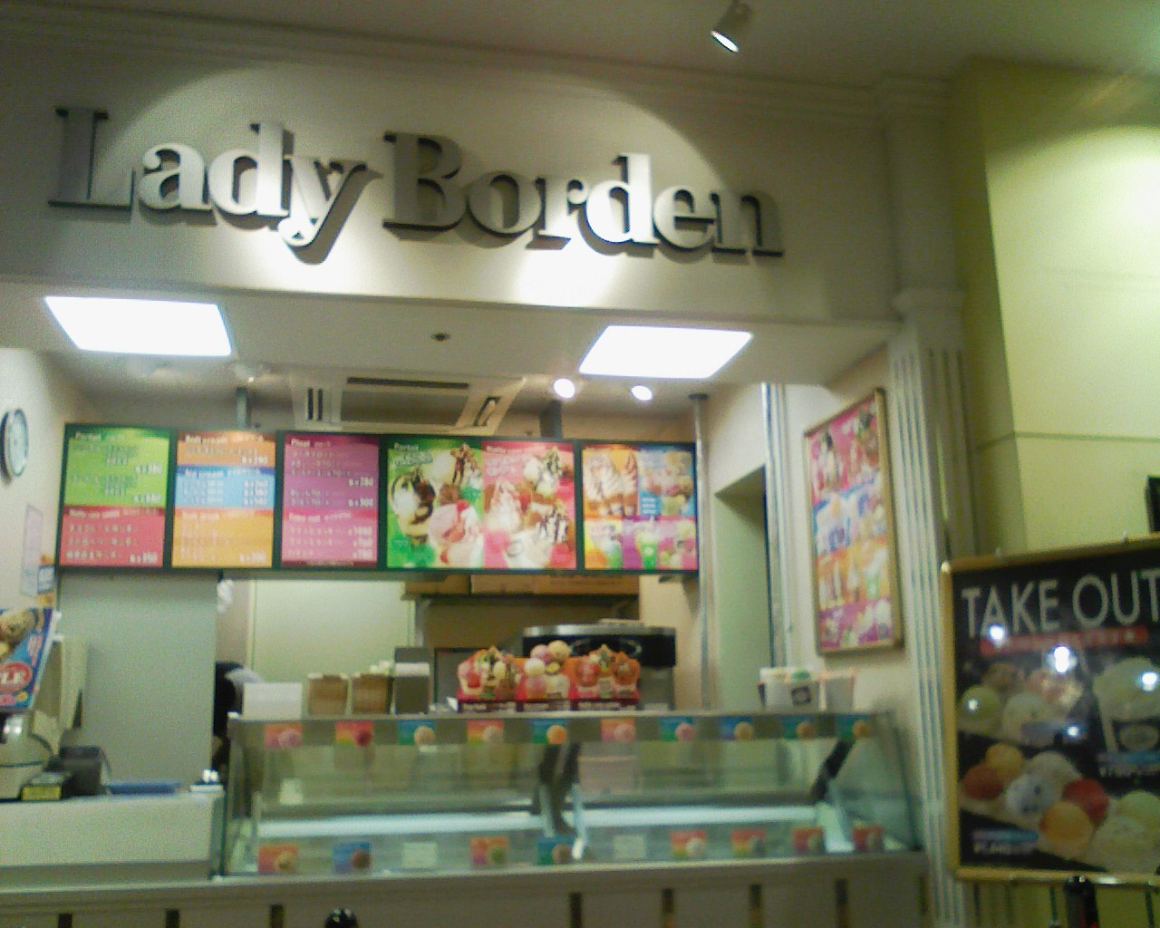 レディーボーデンアイスクリームショップ川崎BE店